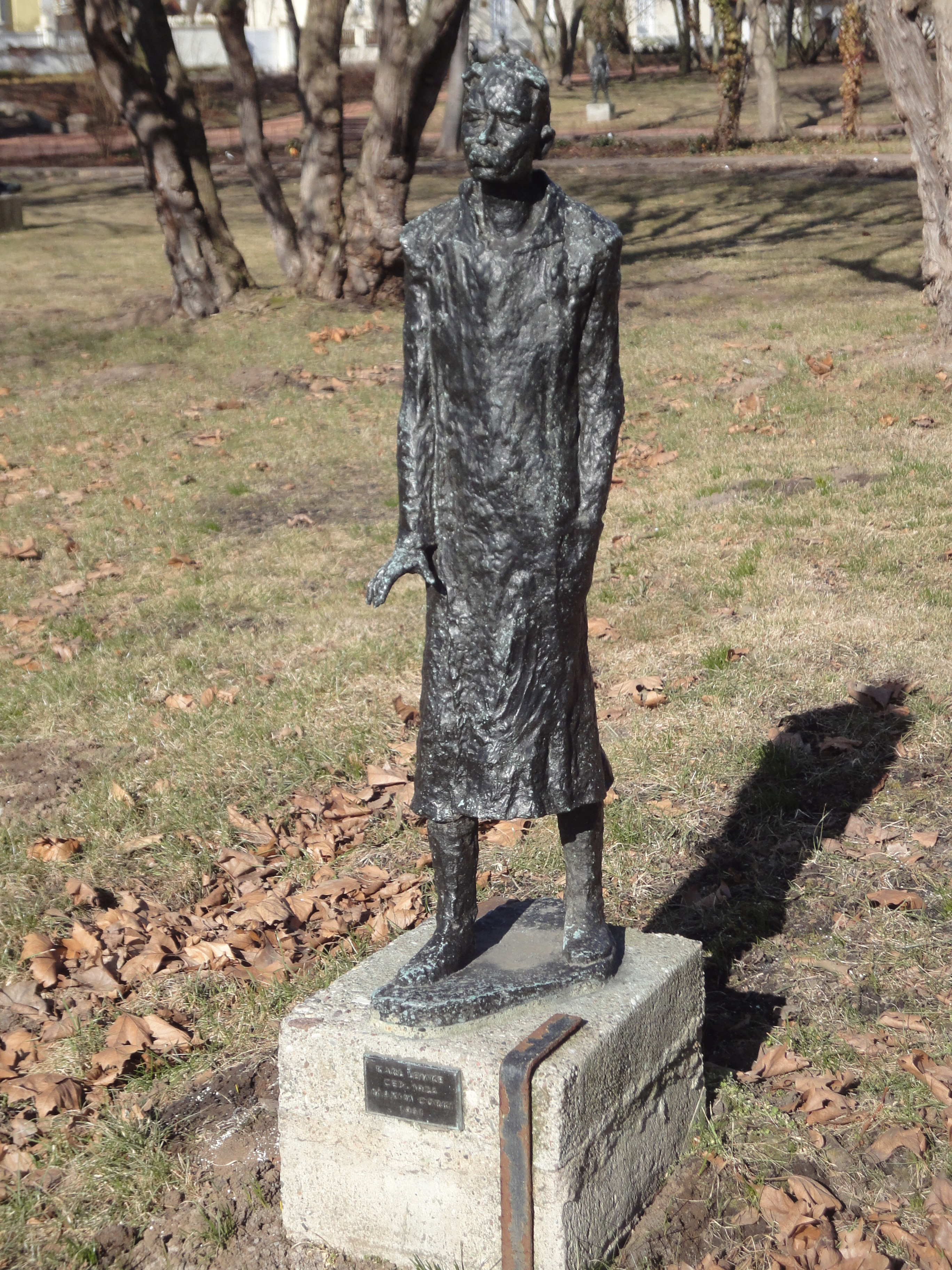 Skulptur "Maxim Gorki" (1961) von Karl Lemke, aufgestellt im Plastik-Park Leuna